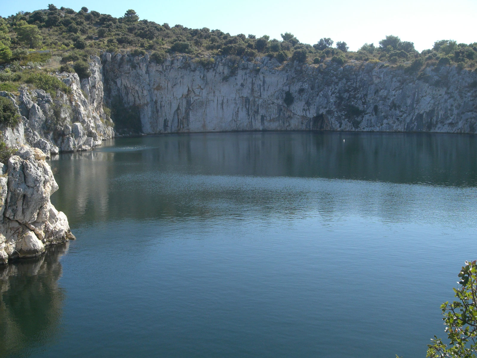 Jezero Zmajevo oko, Rogoznica